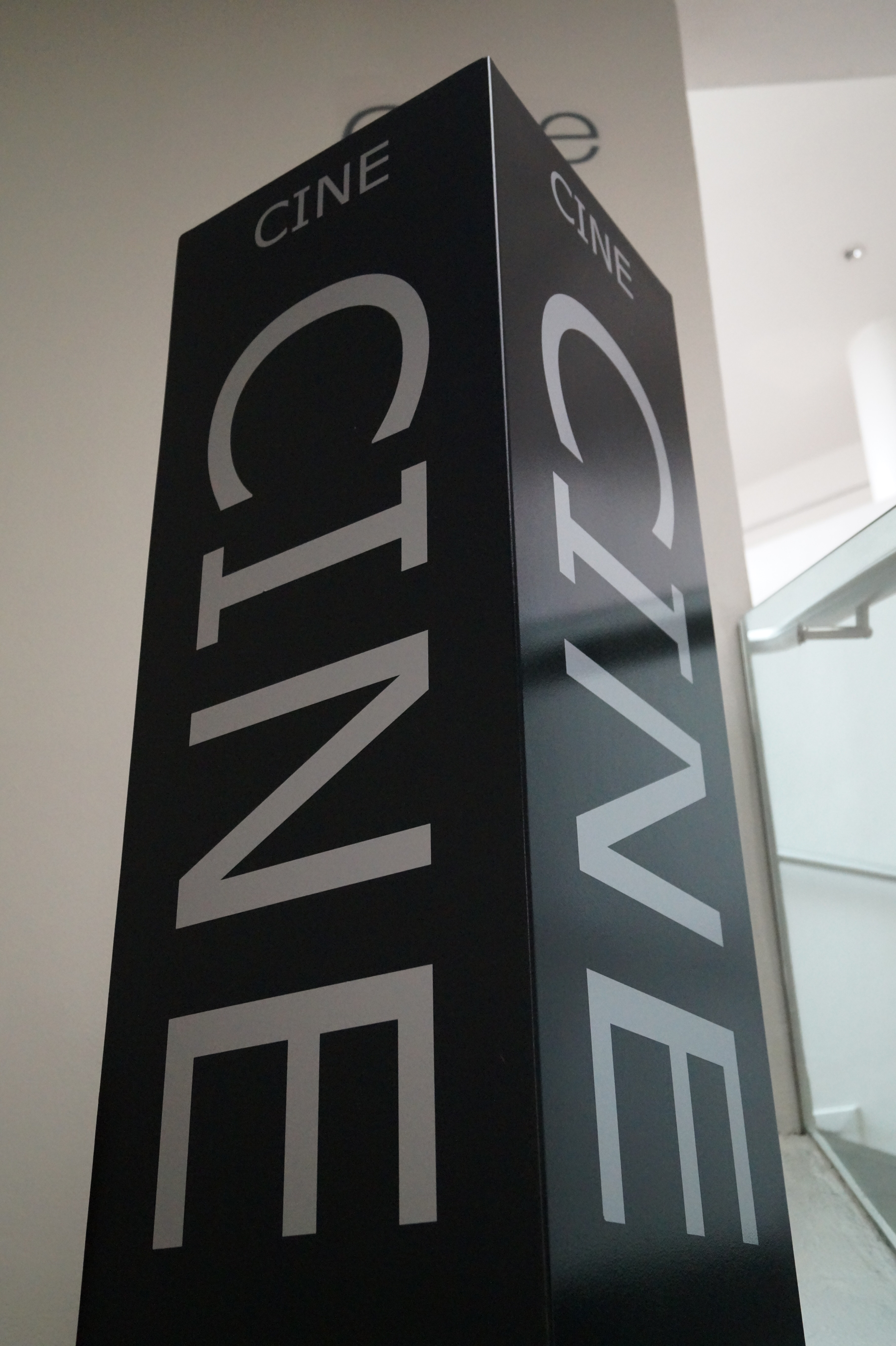 Indicación de la ubicacíon del cine Lido, con forma rectangular en prisma, letras en mayúsculas en estándar, con un contraste de fondo negro y letras blancas, en el Centro Cultural Bella Epoca, Colonia Condesa, Mexico.